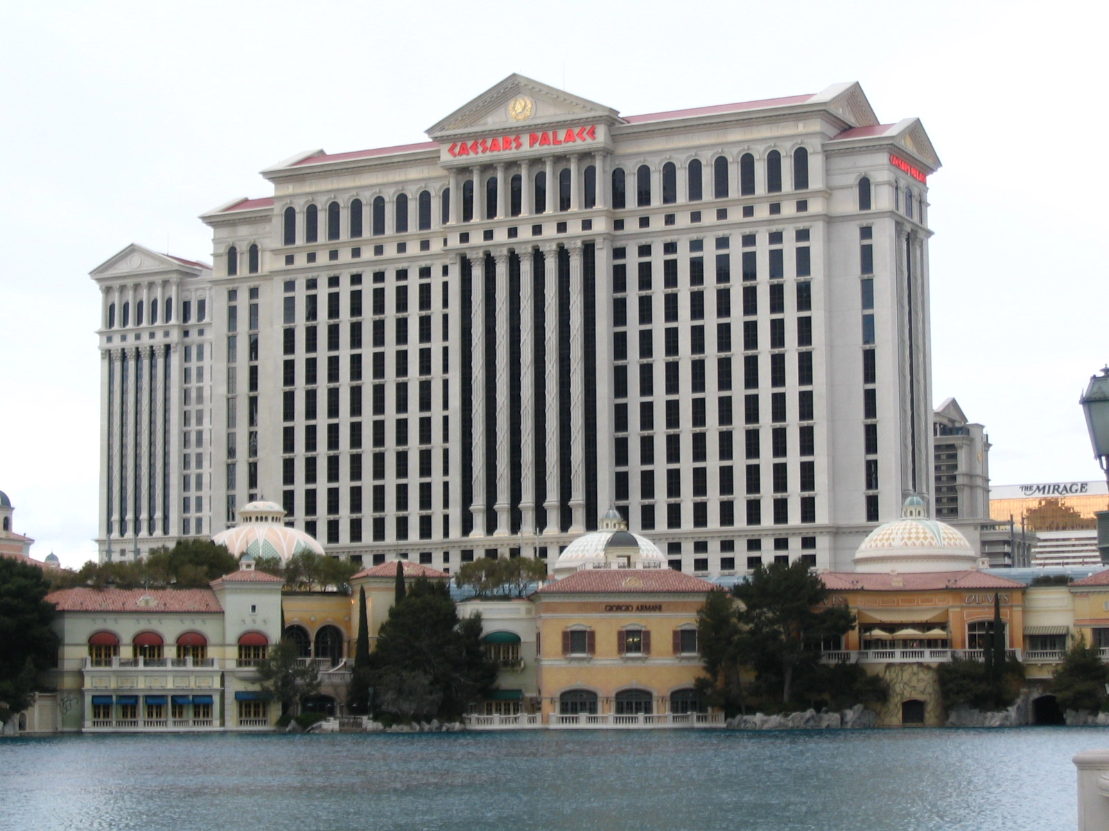 Caesar's Palace, Las Vegas